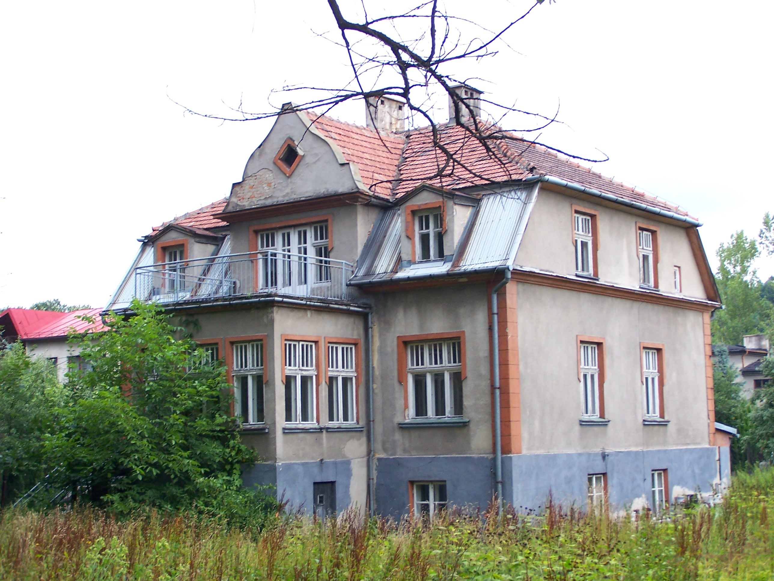 Willa przy ulicy Mikołaja Kopernika w Żywcu.